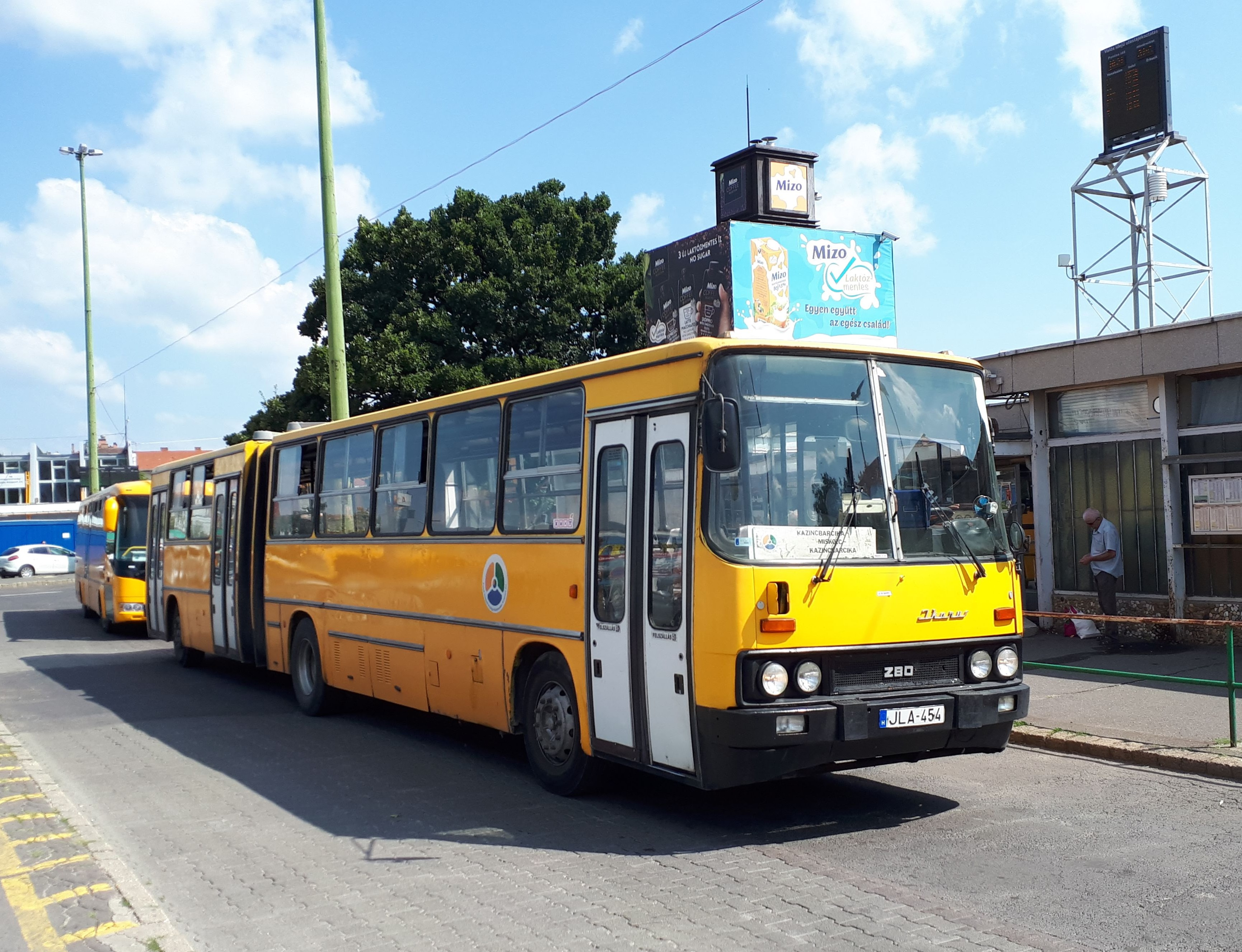 Az ÉMKK JLA-454 rendszámú Ikarus 280 típusú busza Miskolcon, a 3765-ös helyközi járaton.